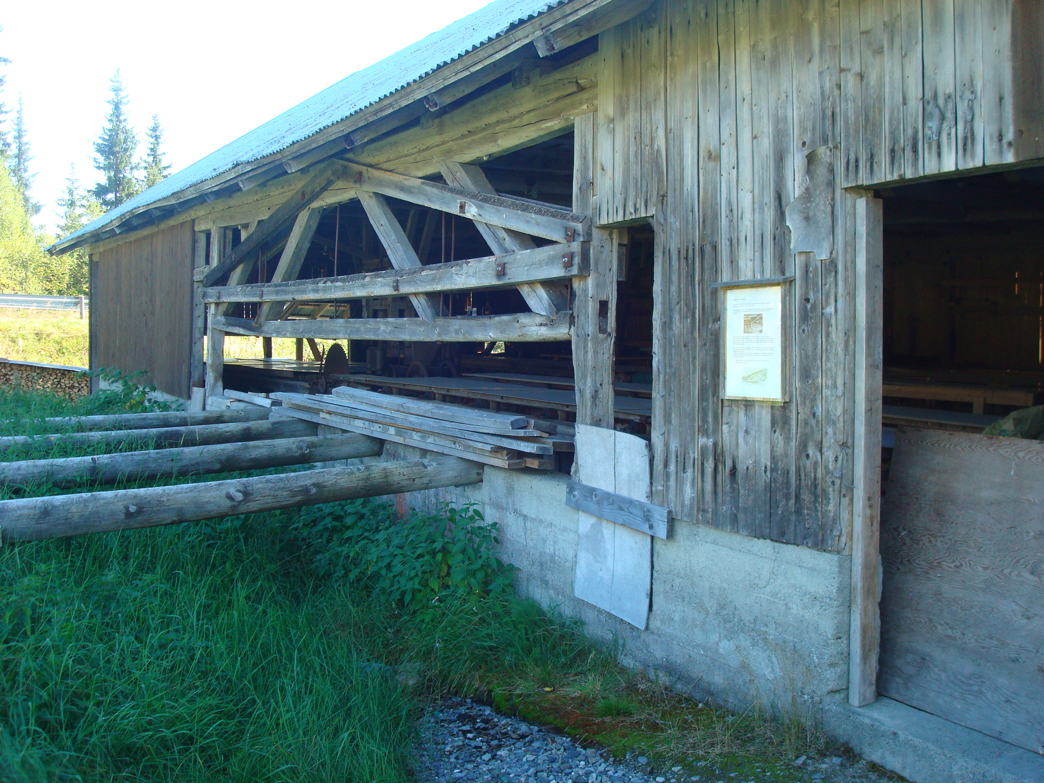 Grønvold sag og mølle i Torpa